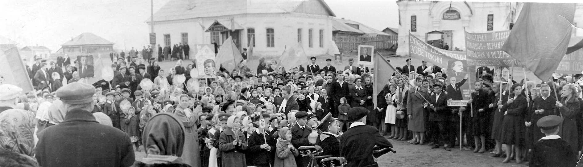 Редкая панорамная фотография Половинного, датированная 1957 годом. На снимке - митинг половинцев в честь 40-летия Великой Октябрьской социалистической революции на фоне еще неразрушенной Покровской церкви.